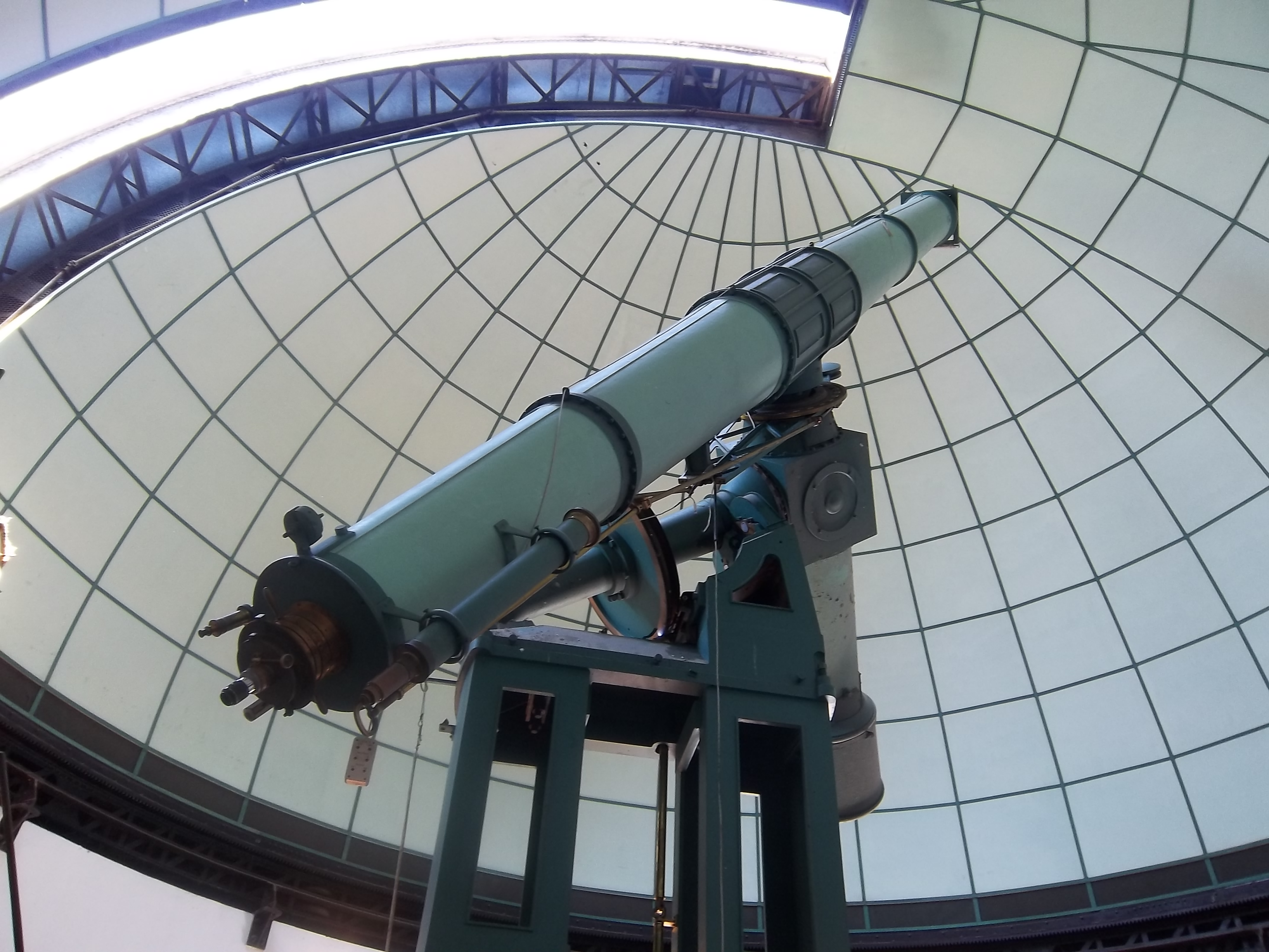 Telescopio refractor Gran Ecuatorial Gautier en el Observatorio de La Plata, provincia de Buenos Aires, Argentina.